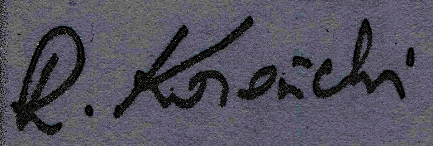 Signature du peintre algérien Rachid Koraichi. Scan d'après catalogue dédicacé